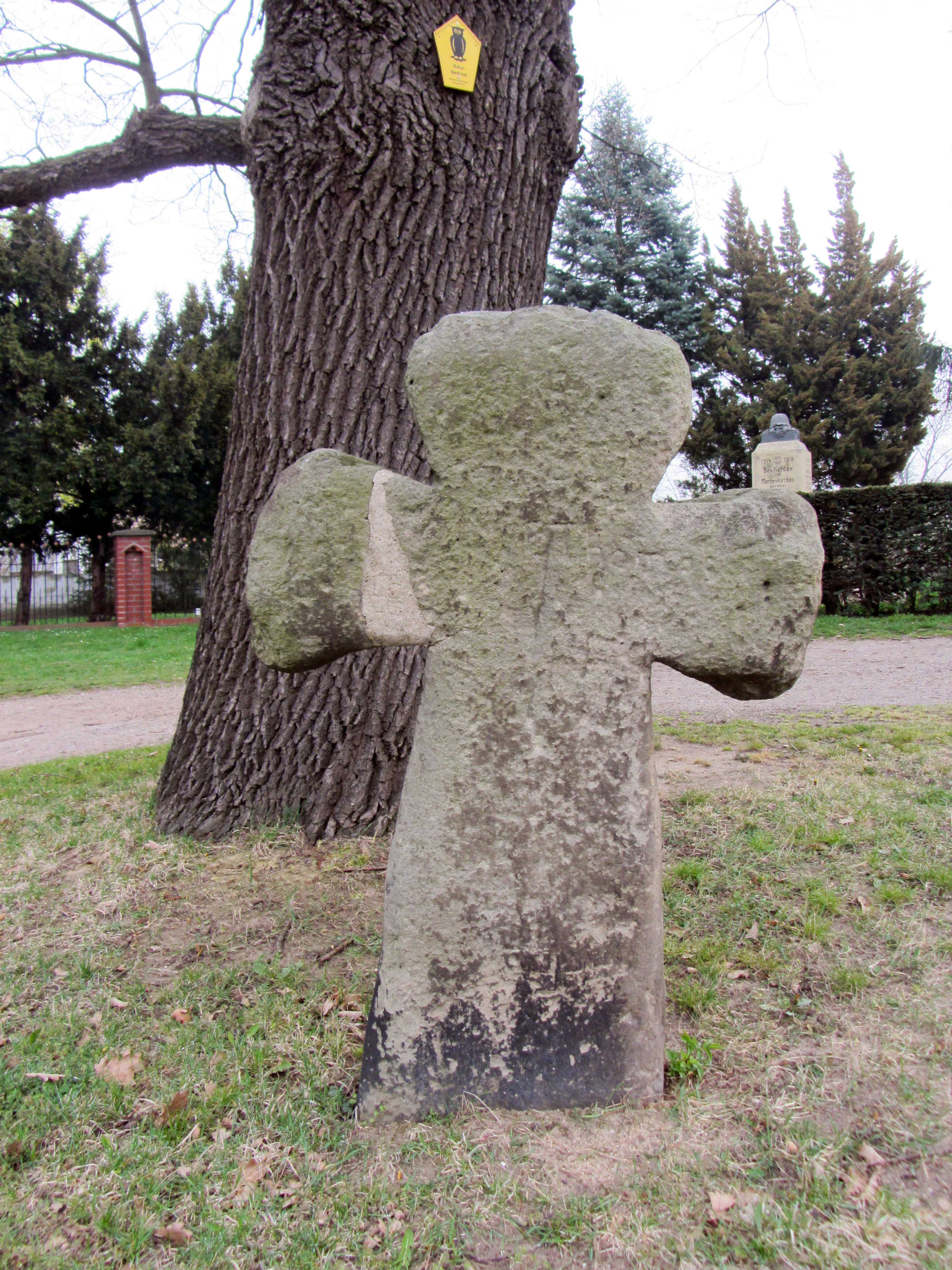 Steinkreuz in Martinskirchen